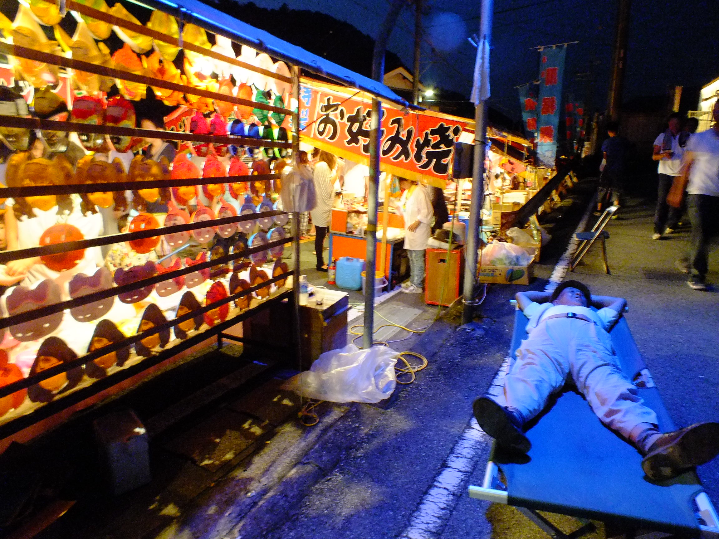 20140729 Ichijima-Kawasuso Matsuri 市島川裾祭（丹波市市島町）